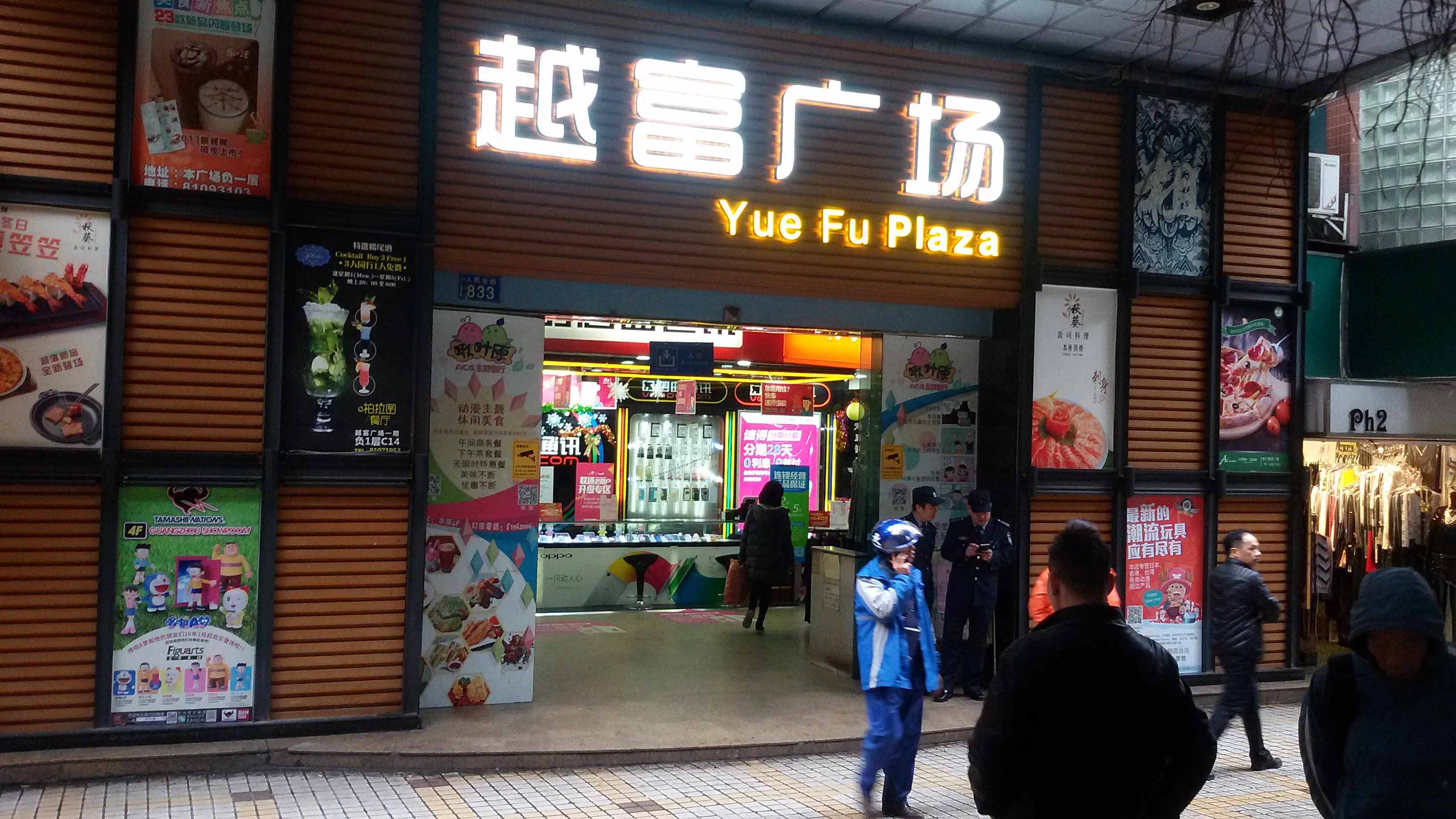 粵語: 越富广场